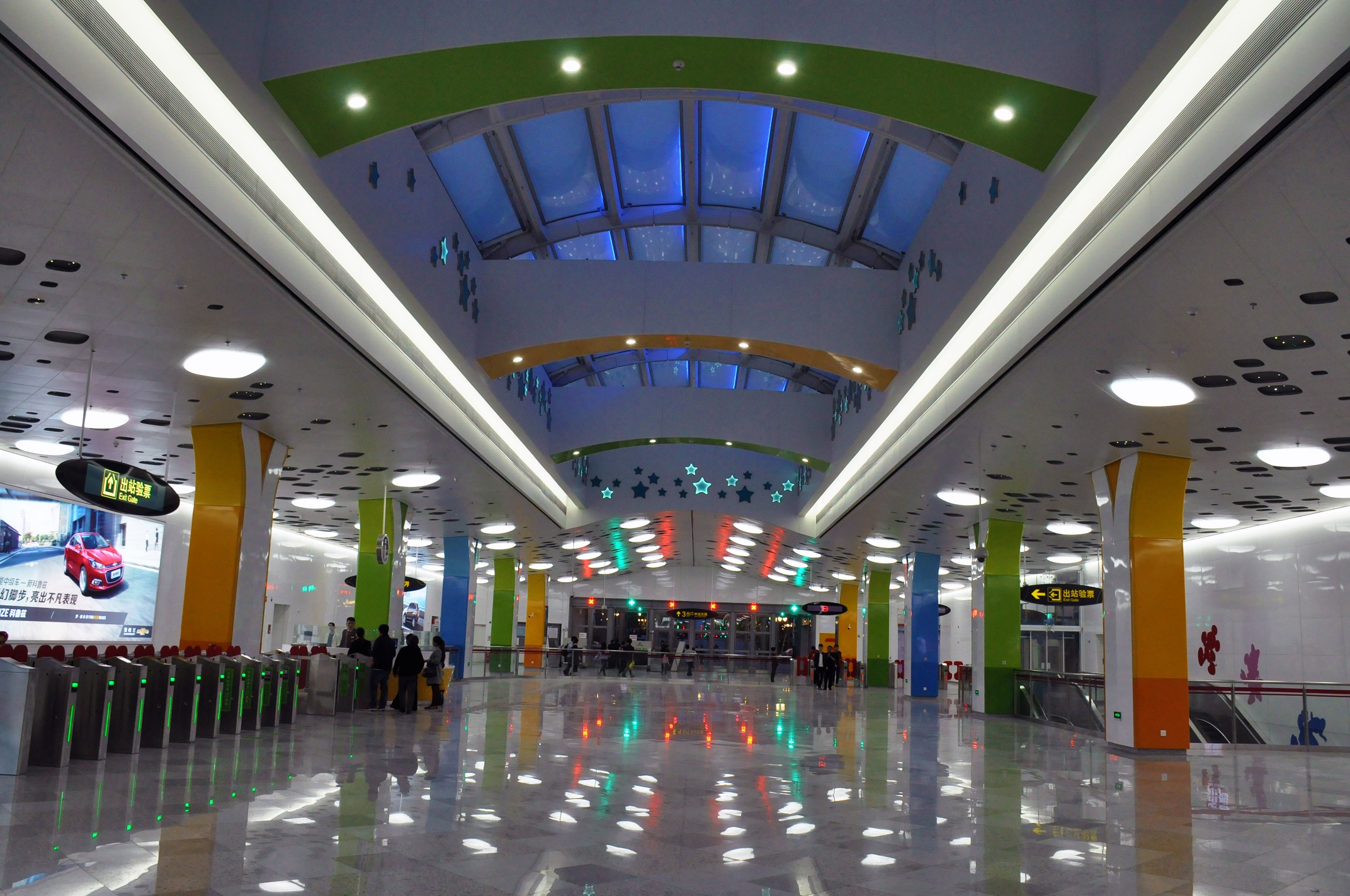 中文（中国大陆）: 上海轨道交通11号线迪士尼站